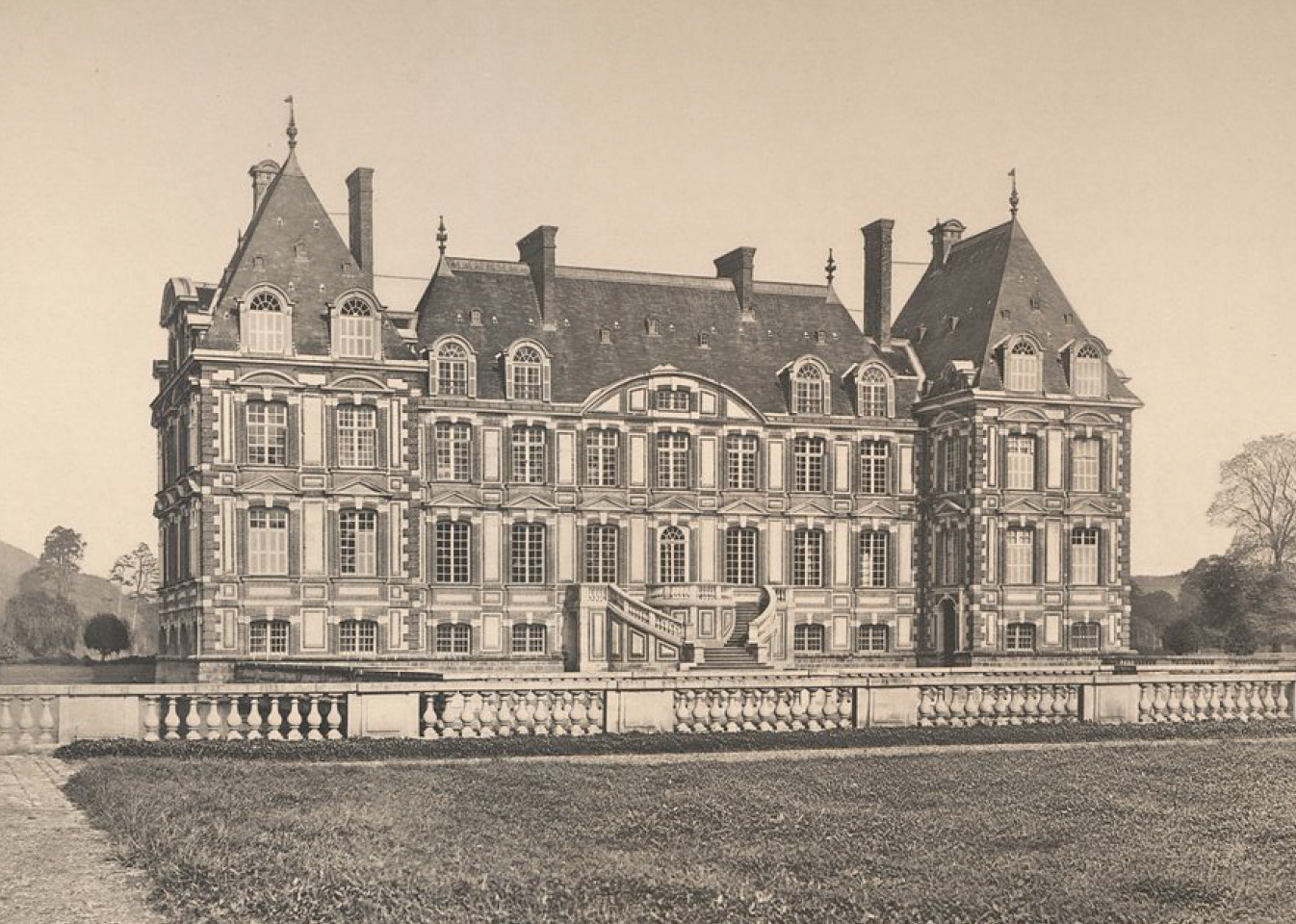 Schloss Cany in Cany-Barville, Seine-Maritime